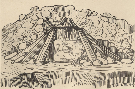 Fürstengrab von Helmsdorf